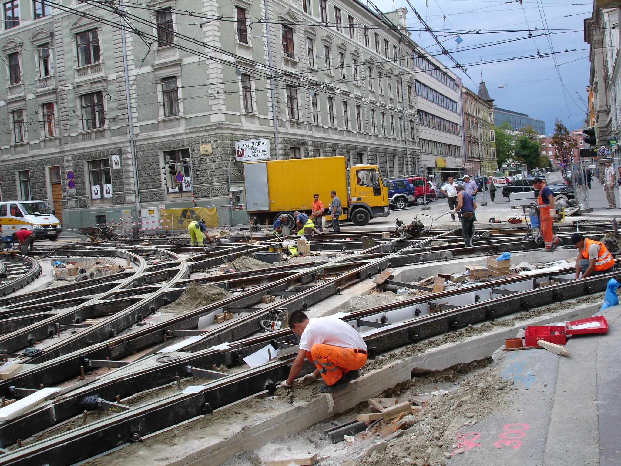 Baustelle in bei der Kreuzung Anichstraße, Bürgerstraße für den Ausbau der Regionalbahn in Innsbruck